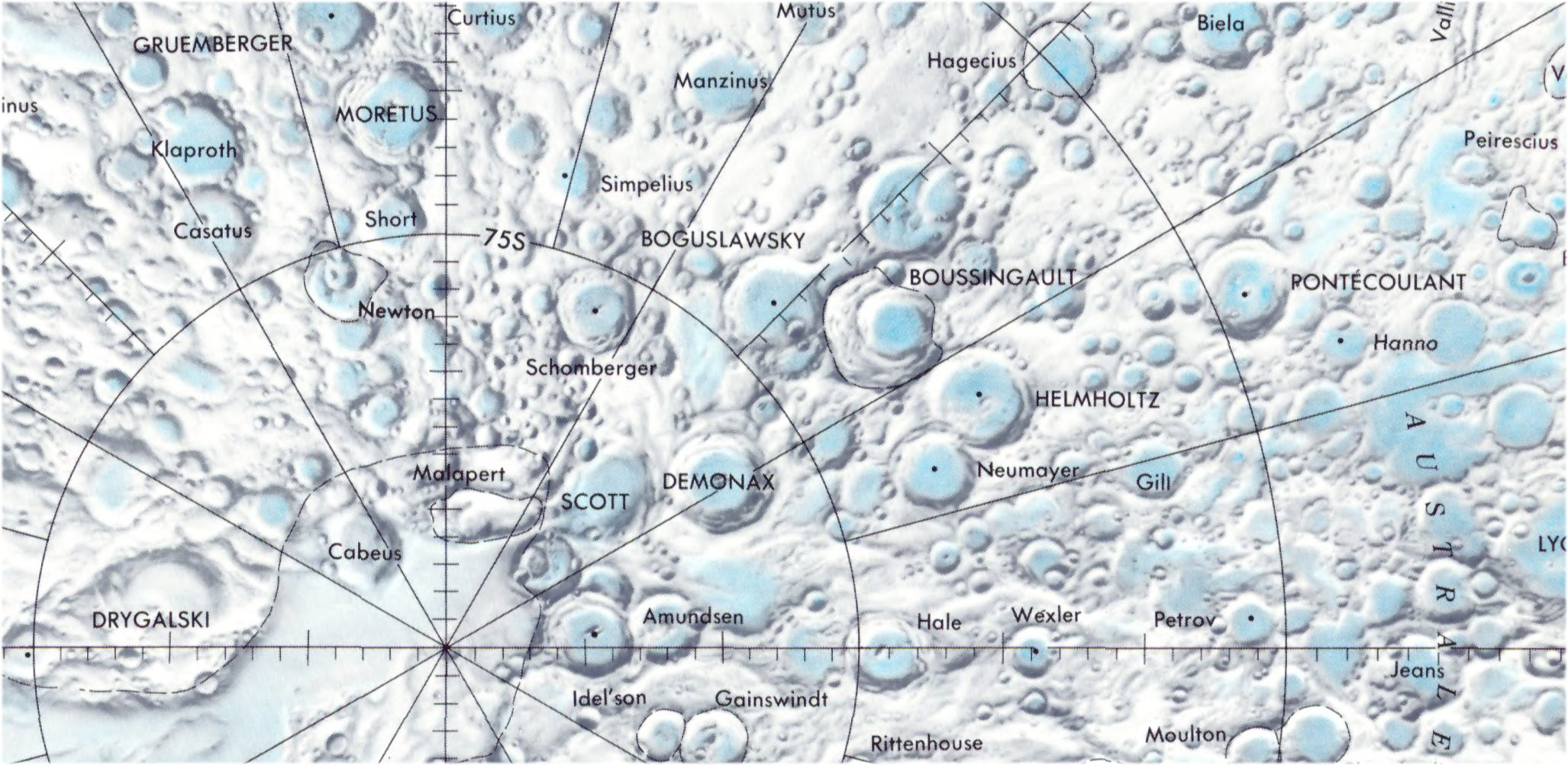 Cráter lunar Pontécoulant. Localización. (Lunar Chart LPC1. Second Edition)